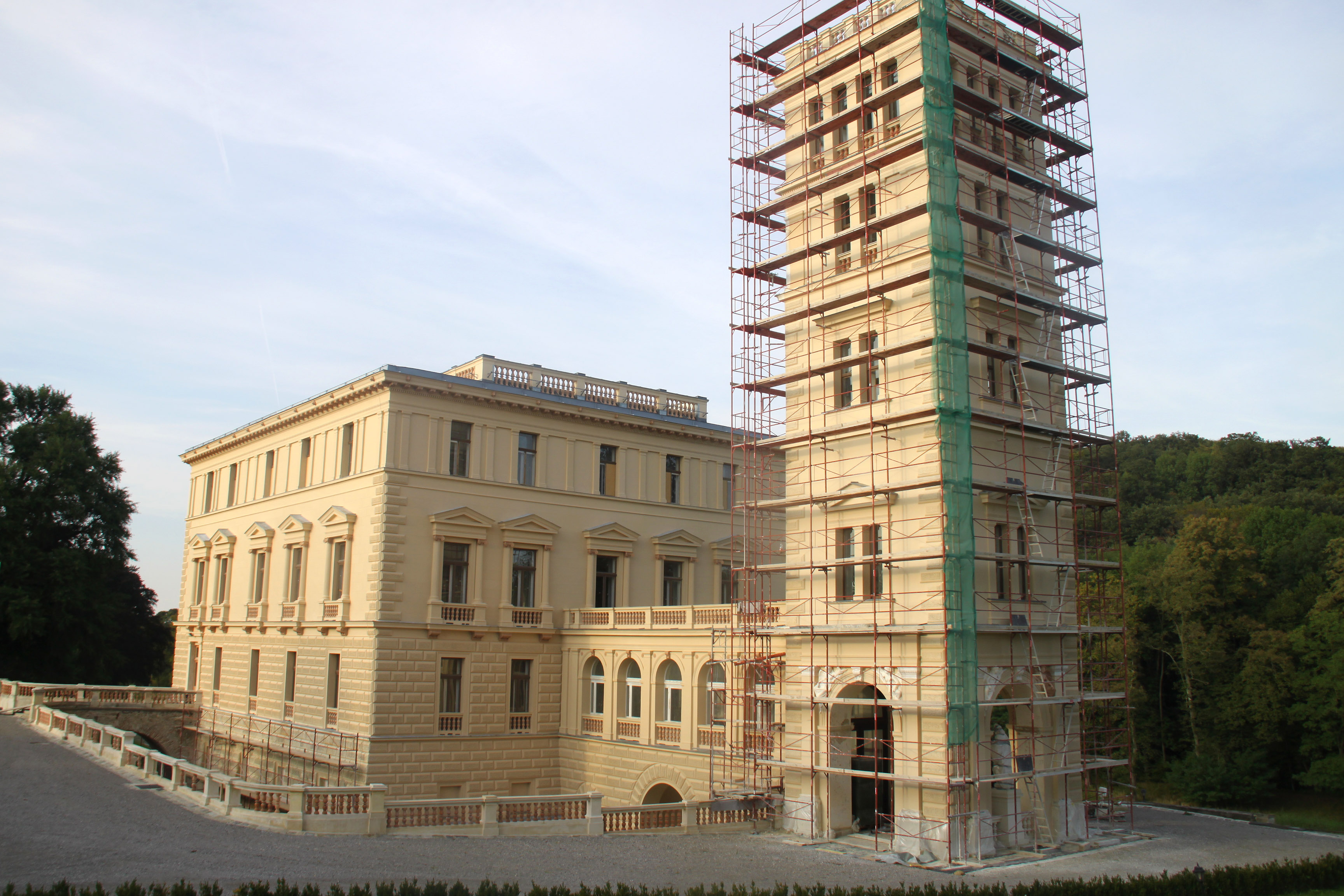 Schloss Rappoltenkirchen, von Theophil Hansen neoklassizistisch umgestaltet